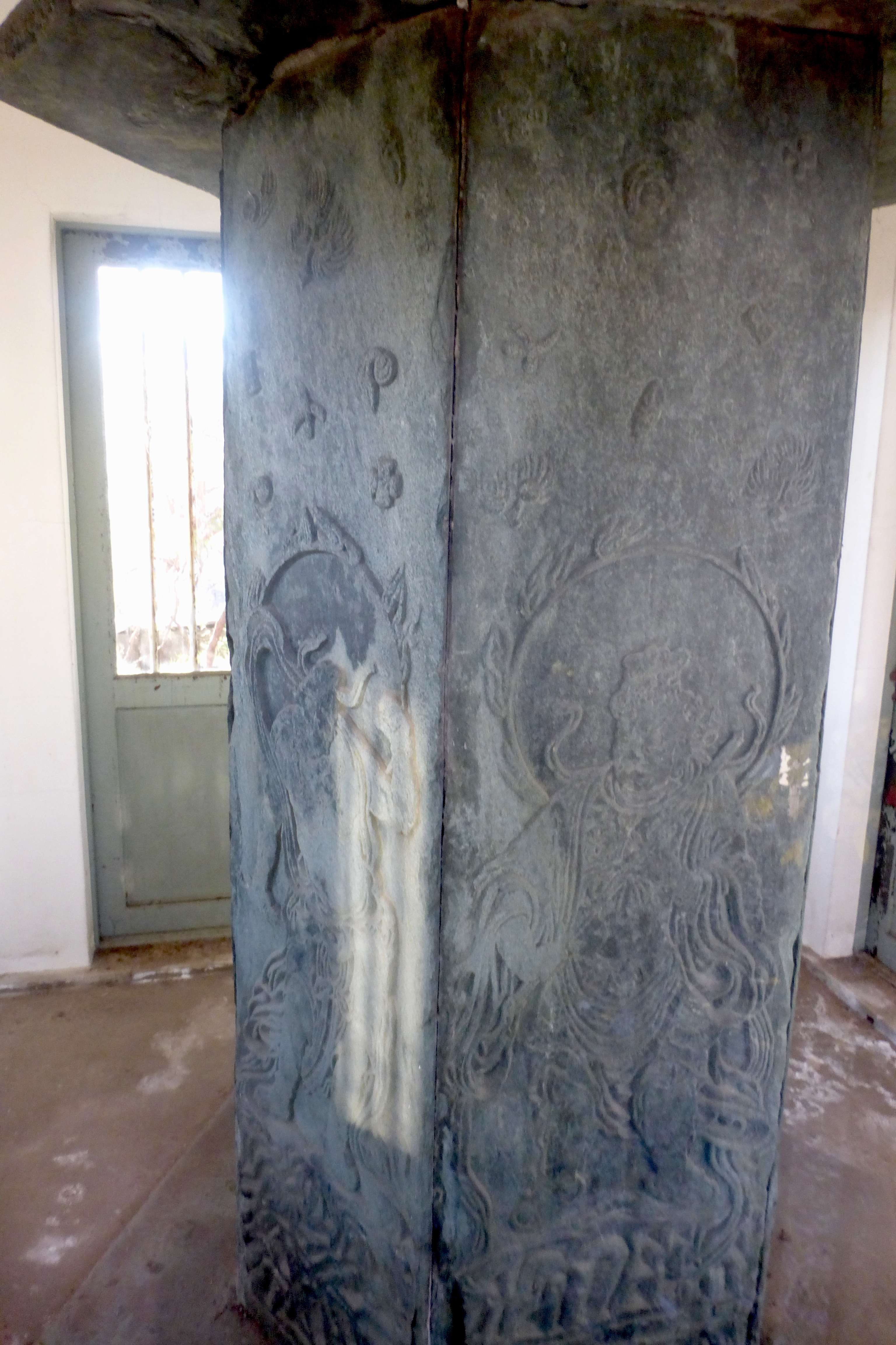 国宝六面石幢、普済寺にて (Japanese National Treasure six surface stone pillar, at Fujisai-ji temple)